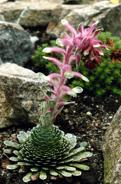 Saxifraga federici-augusti subsp. grisebachii